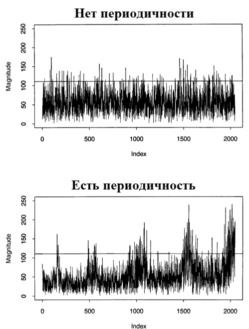 сравнение двух результатов статистического теста бинарной последовательности при наличии и отсутсвии переодических свойств